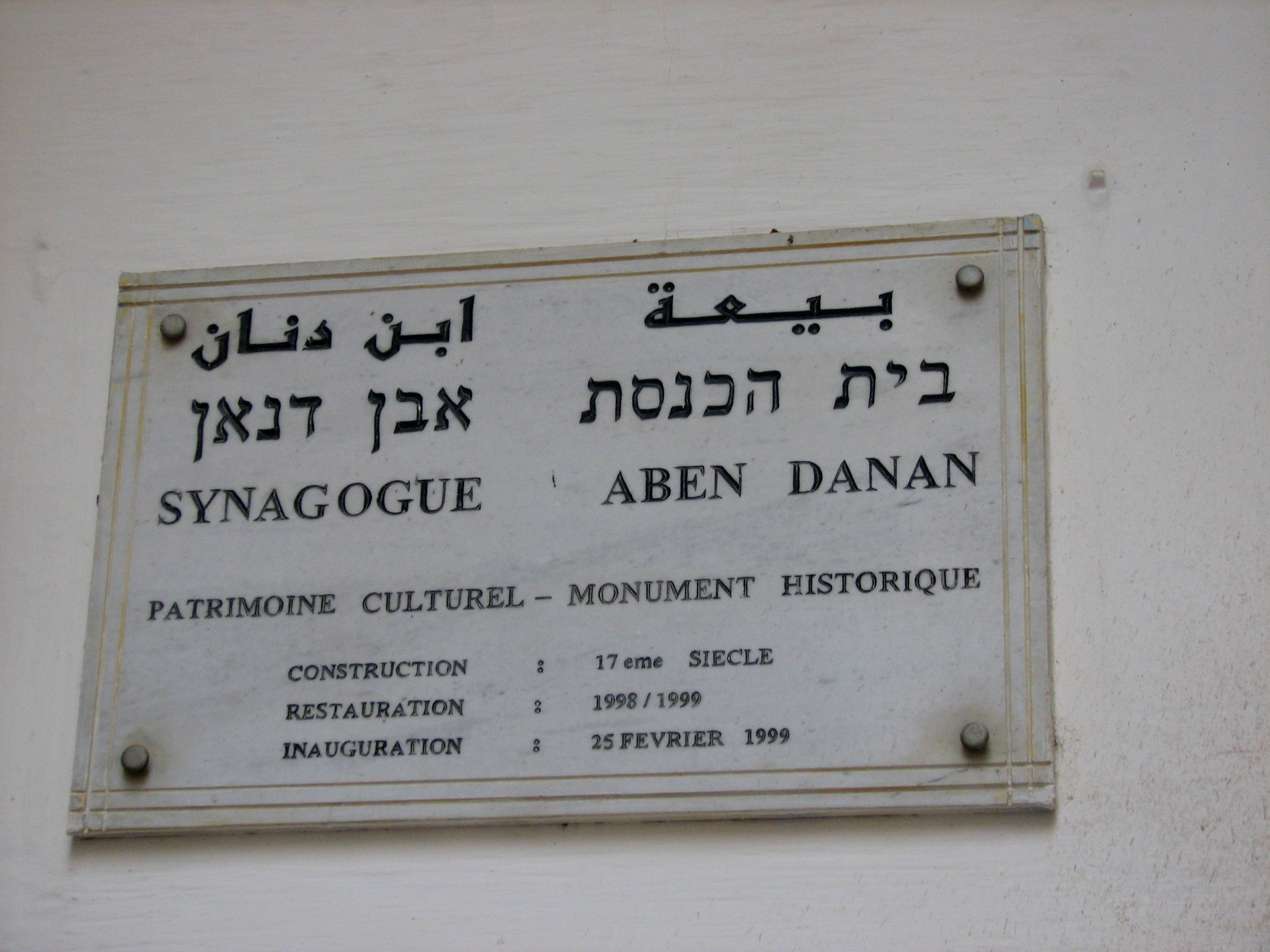 Aben Danan synagogue-Fes Morocco בית הכנסת של משפחת אבן דנאן בעיר פס במרוקו. בית לא פעיל. הפך למוזיאון בשנת 1999. מתוחזק עד היום על ידי המשפחה המוסלמית שטיפלה בו בזמן שהיה פעיל""